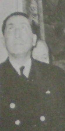 Alberto Tessaire